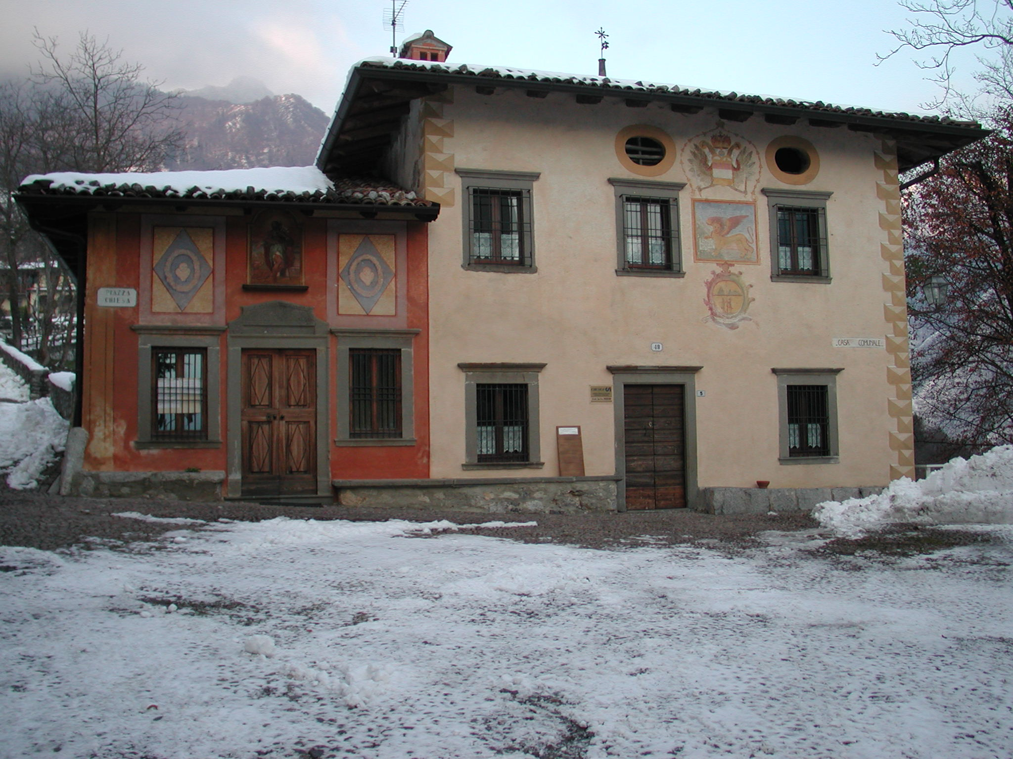 Vecchio municipio di Oltressenda Alta, loc. Nasolino. Val Seriana (BG), Italy